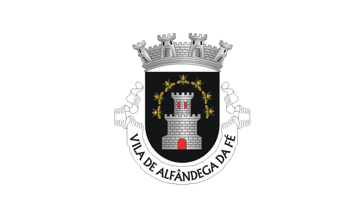 Bandera del municipio y freguesia de Alfândega da Fé (Portugal)